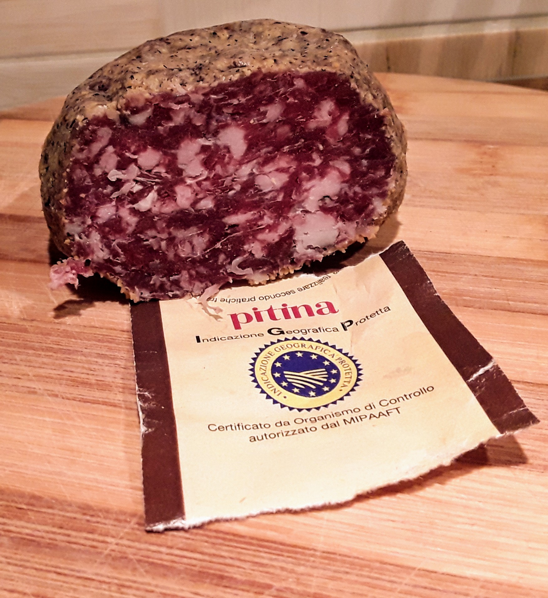 Pitina IGP